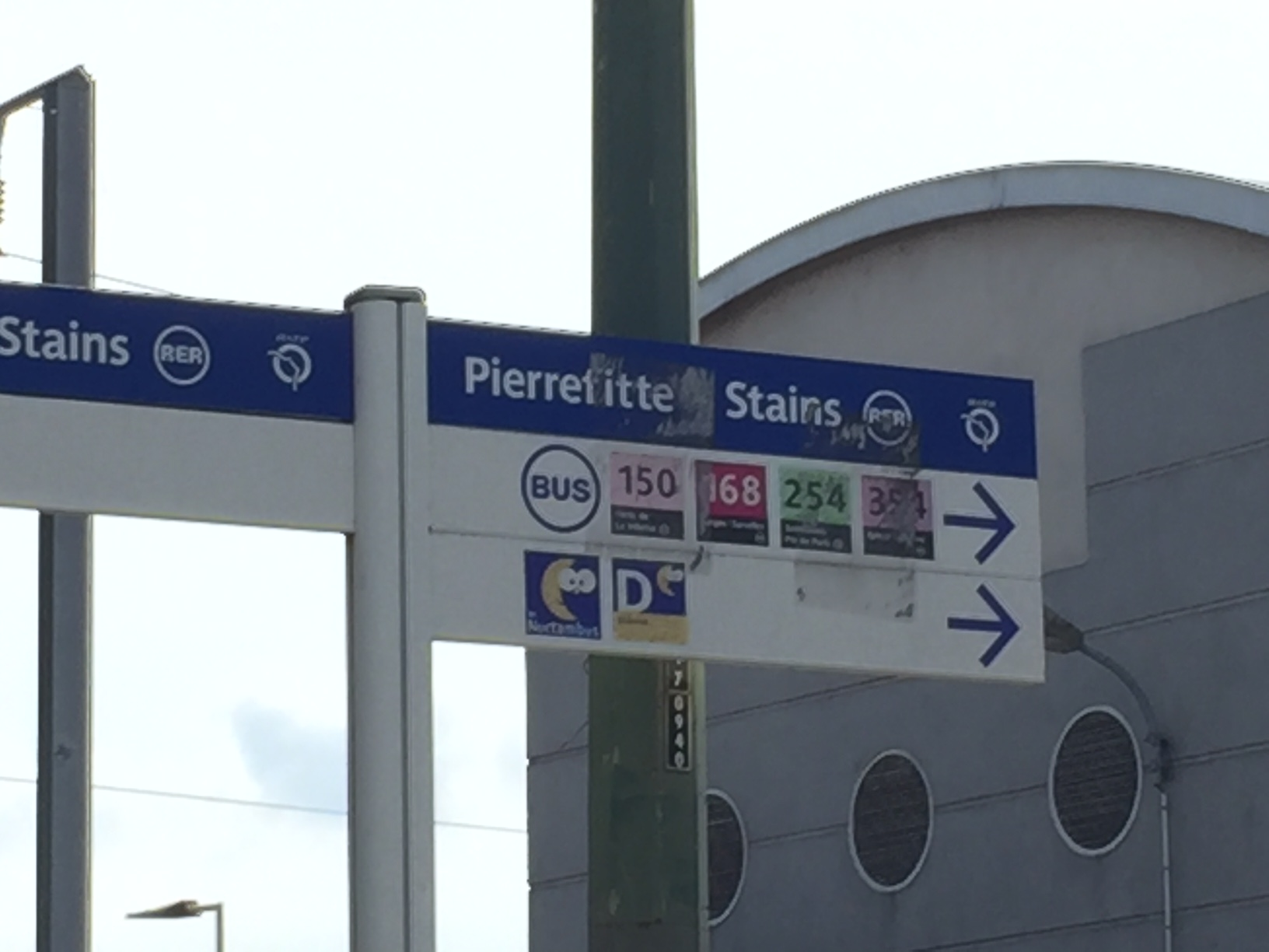 Ancienne signalétique pour les bus Noctambus à la gare de Pierrefitte-Stains en août 2018.